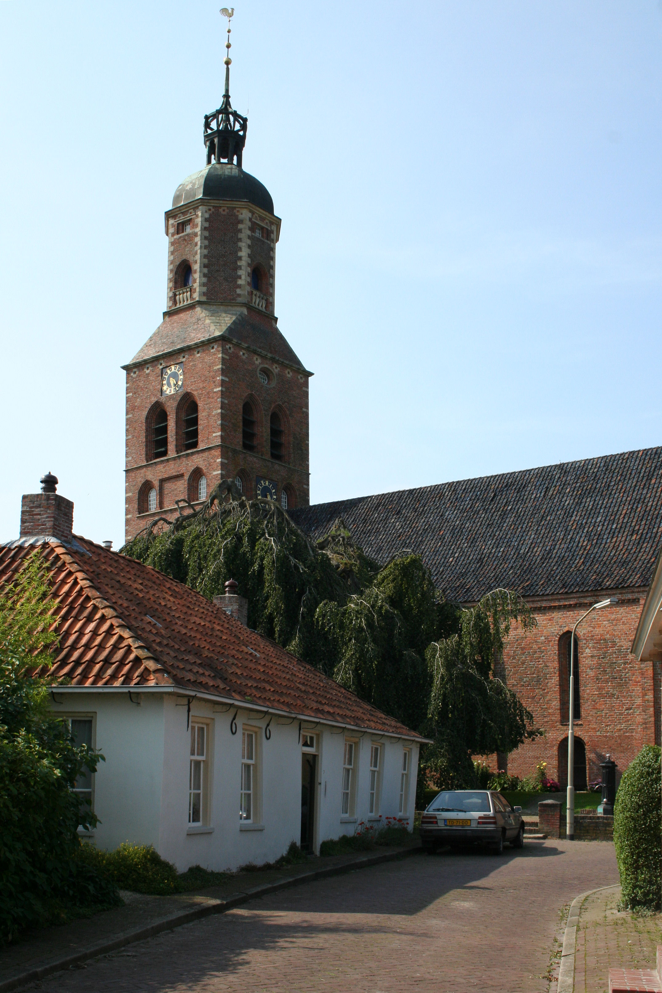 NH-kerk Eenrum